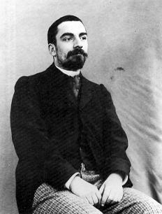 portrait de Louis Dimier